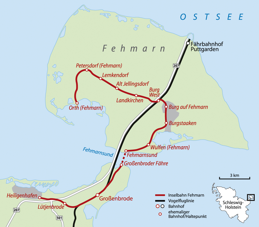 Karte der Inselbahn Fehmarn